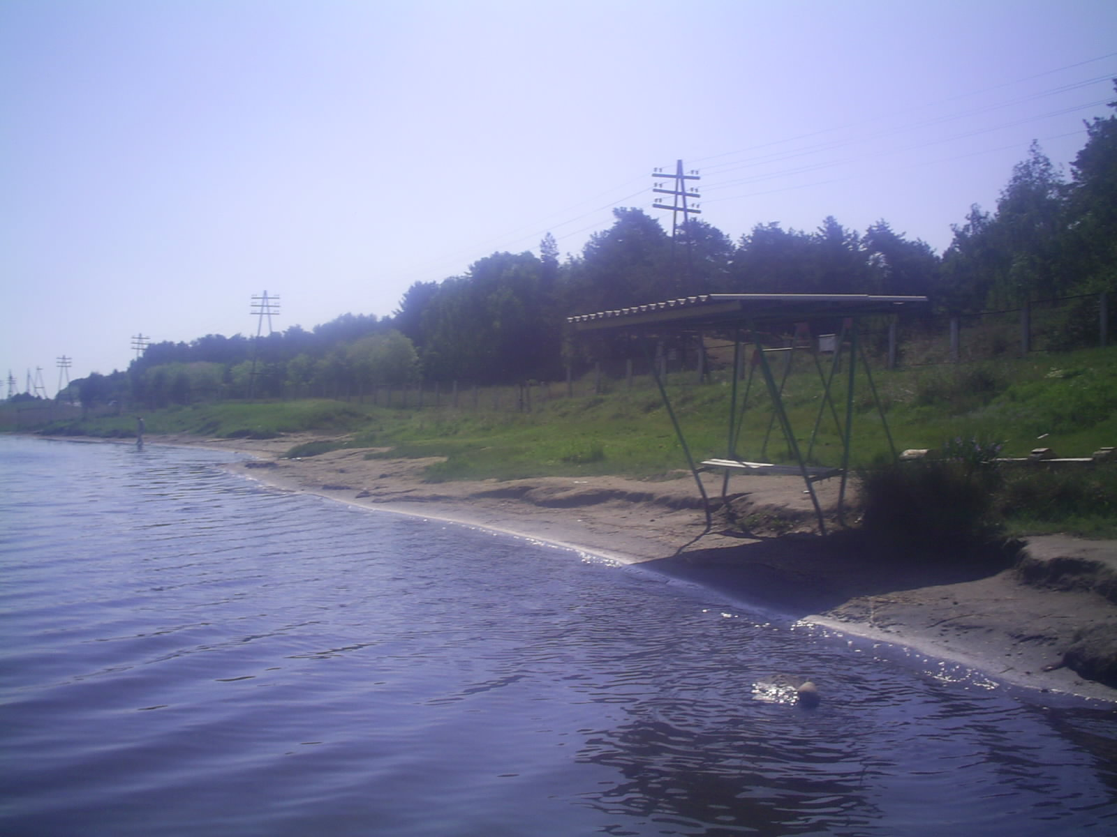 Пляж на Тагарском озере.